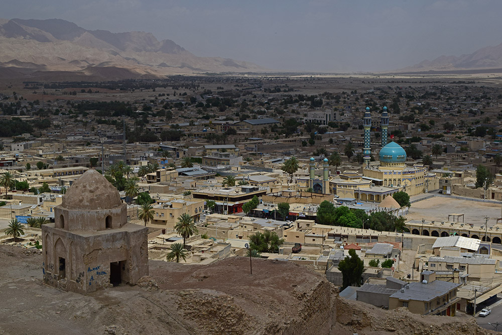 قبرمادر نادر شاه